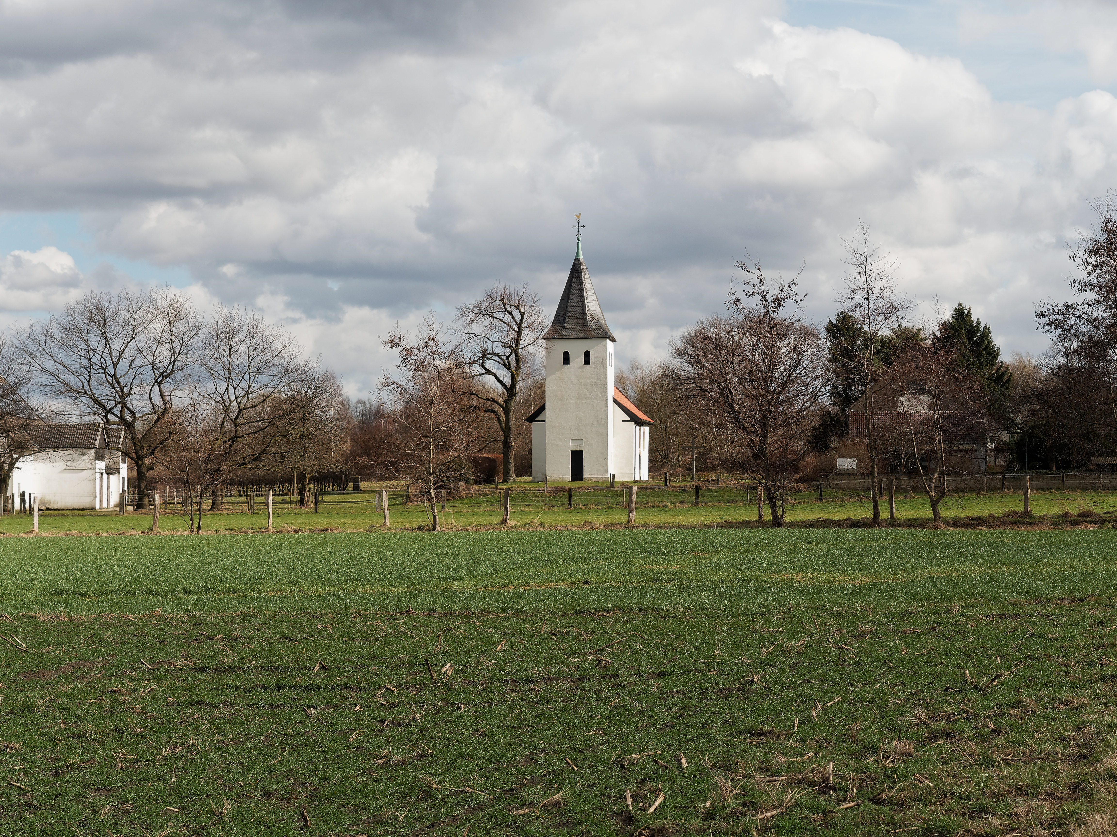 Die Kapelle St Laurentius in Waltrop-Leveringhausen, Denkmal aus der Zeit um 1070. Erstmalig 1343 urkundlich erwähnt. Turm 1886 erneuert.